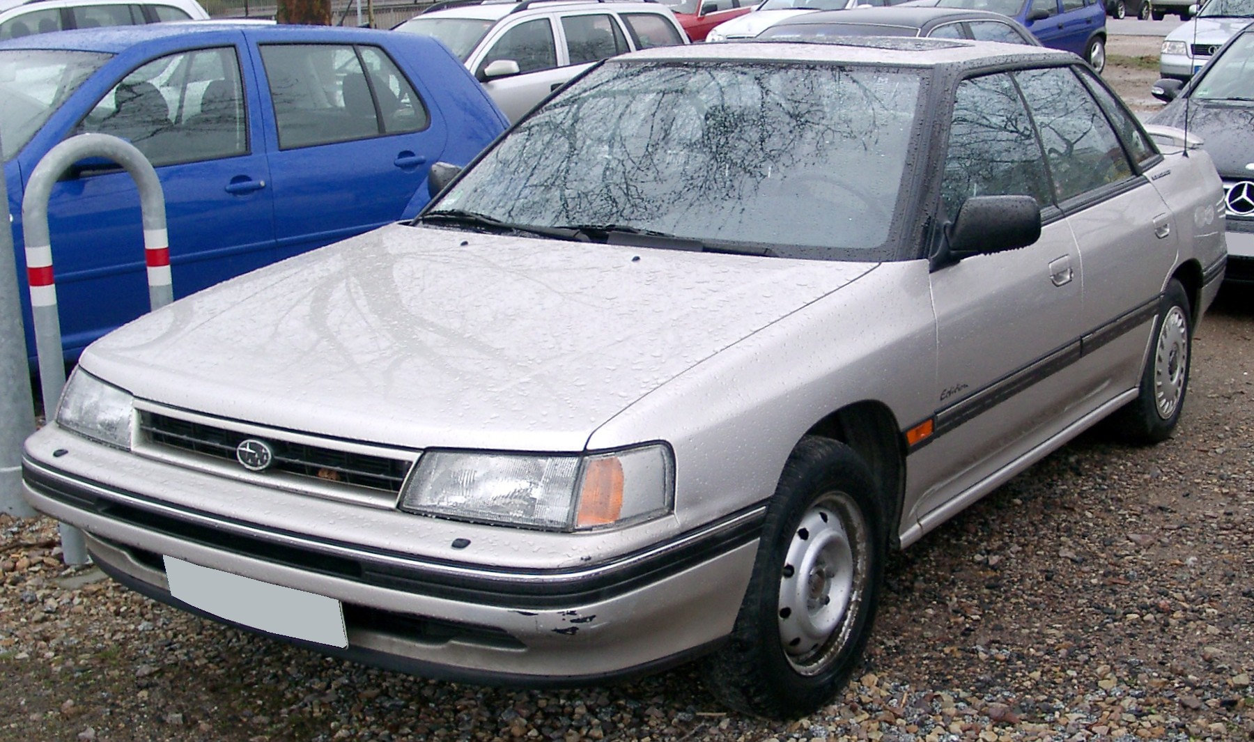 Subaru Legacy, Typ BC/BJF